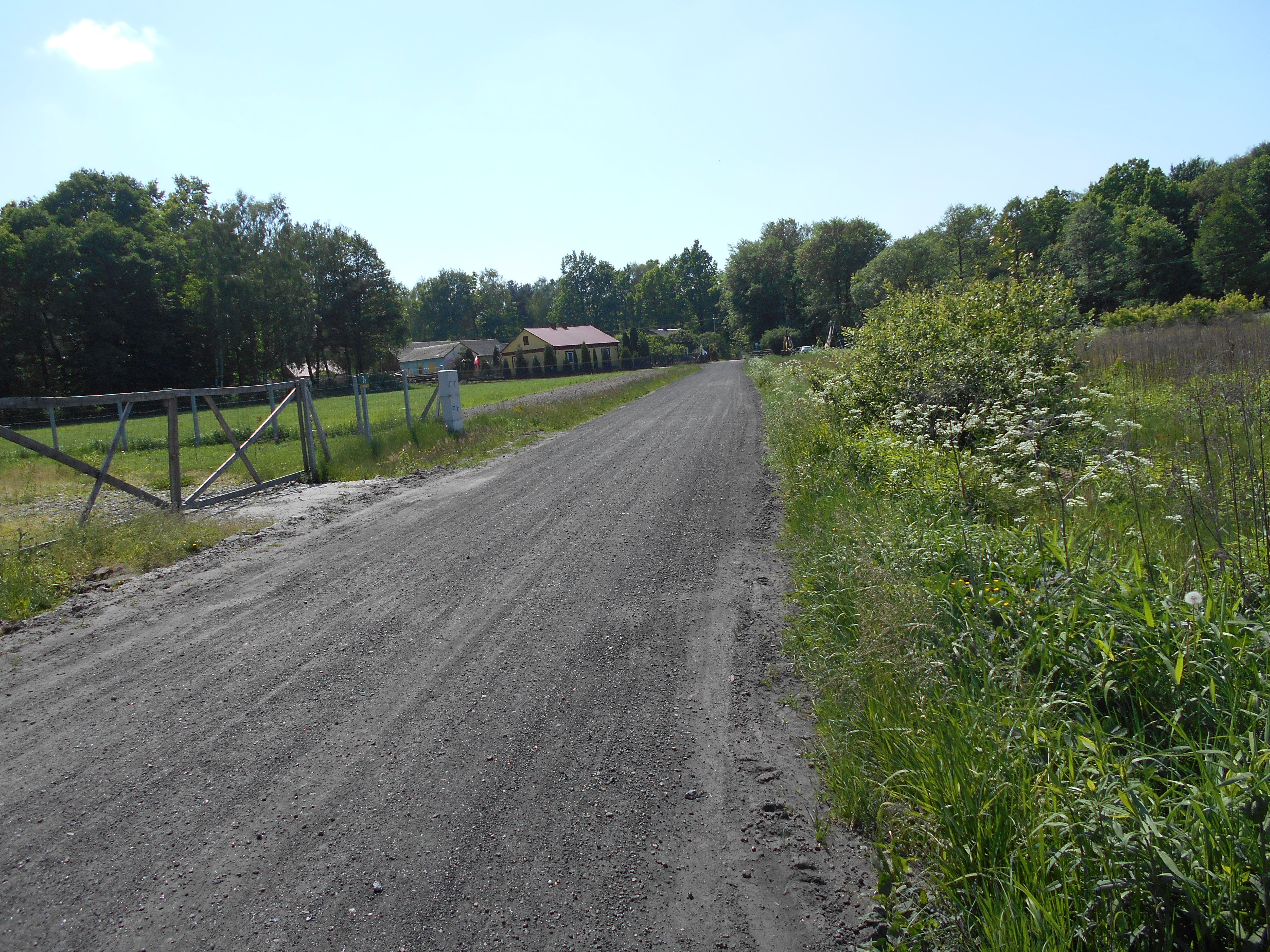 Miejscowość w gminie Dębe Wielkie